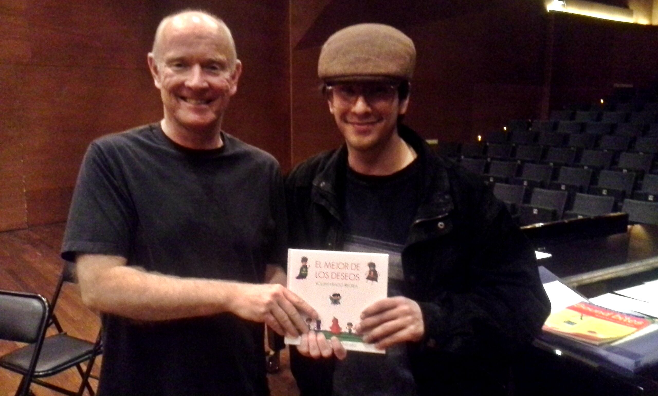 Richard Frostick recibiendo libro El Mejor de los Deseos